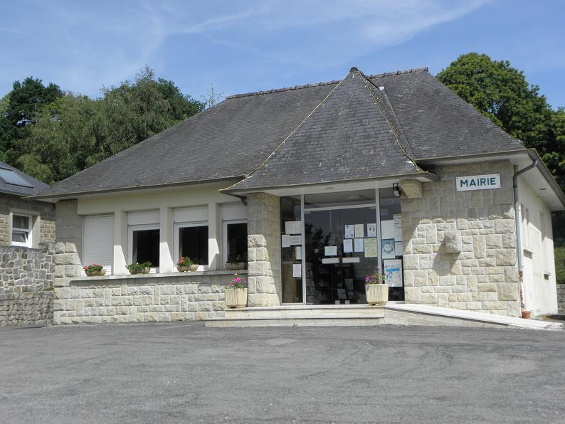 Mairie de La Chapelle-Saint-Aubert (35).